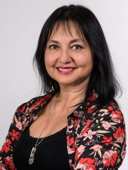 Carolina Marzán Pinto en la fotografía oficial de diputados periodo 2018-2022. (Fotos: Christel Andler, René Lescornez, Johanna Zárate)